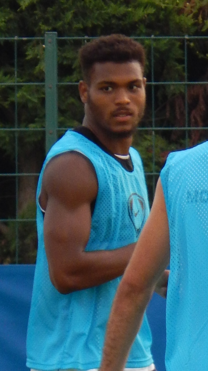 Steve Mounié (Juillet 2015), à Grammont.